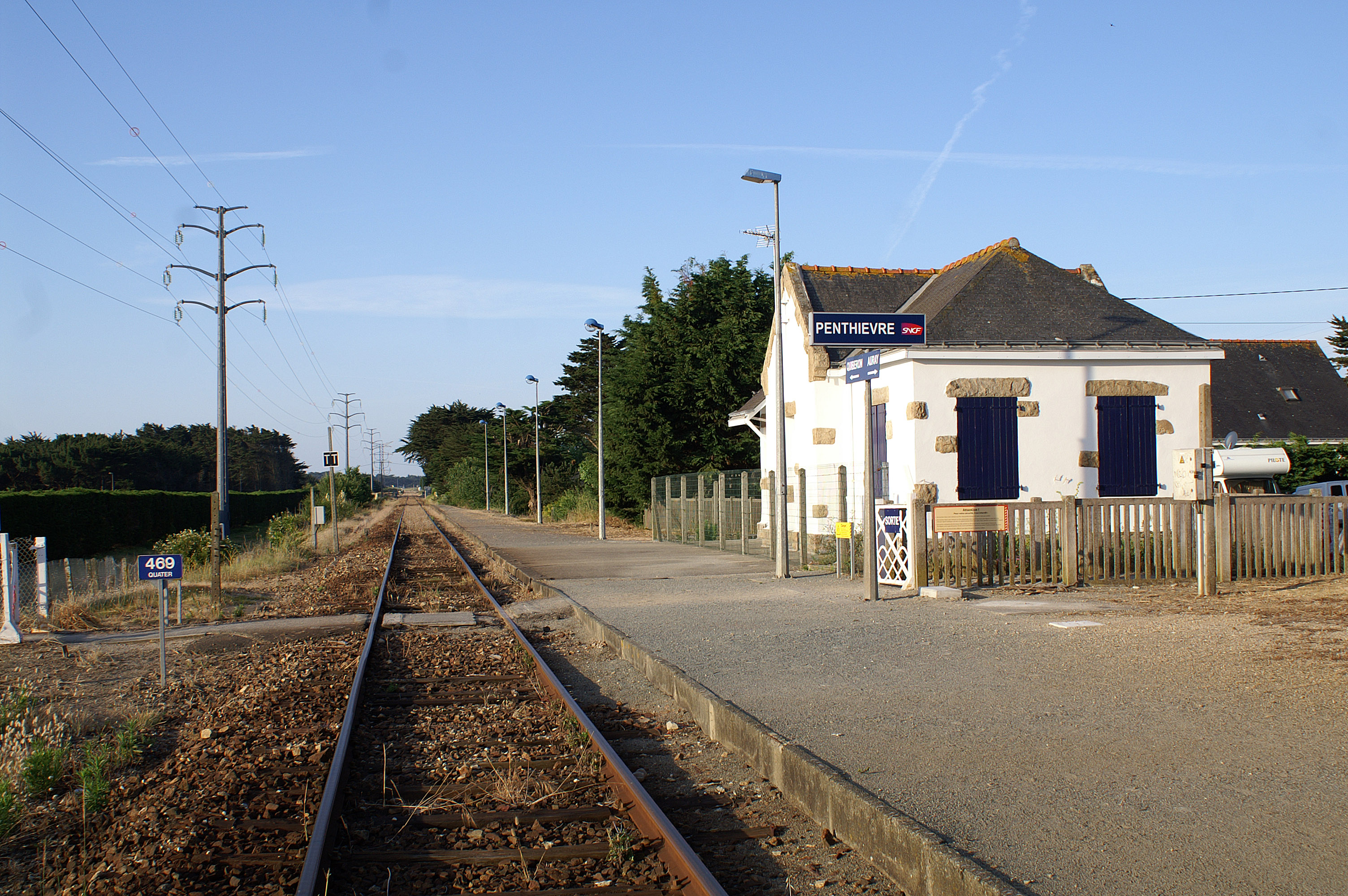 La gare de Penthièvre la voie en direction de Quiberon, et l'ancien bâtiment voyageurs.